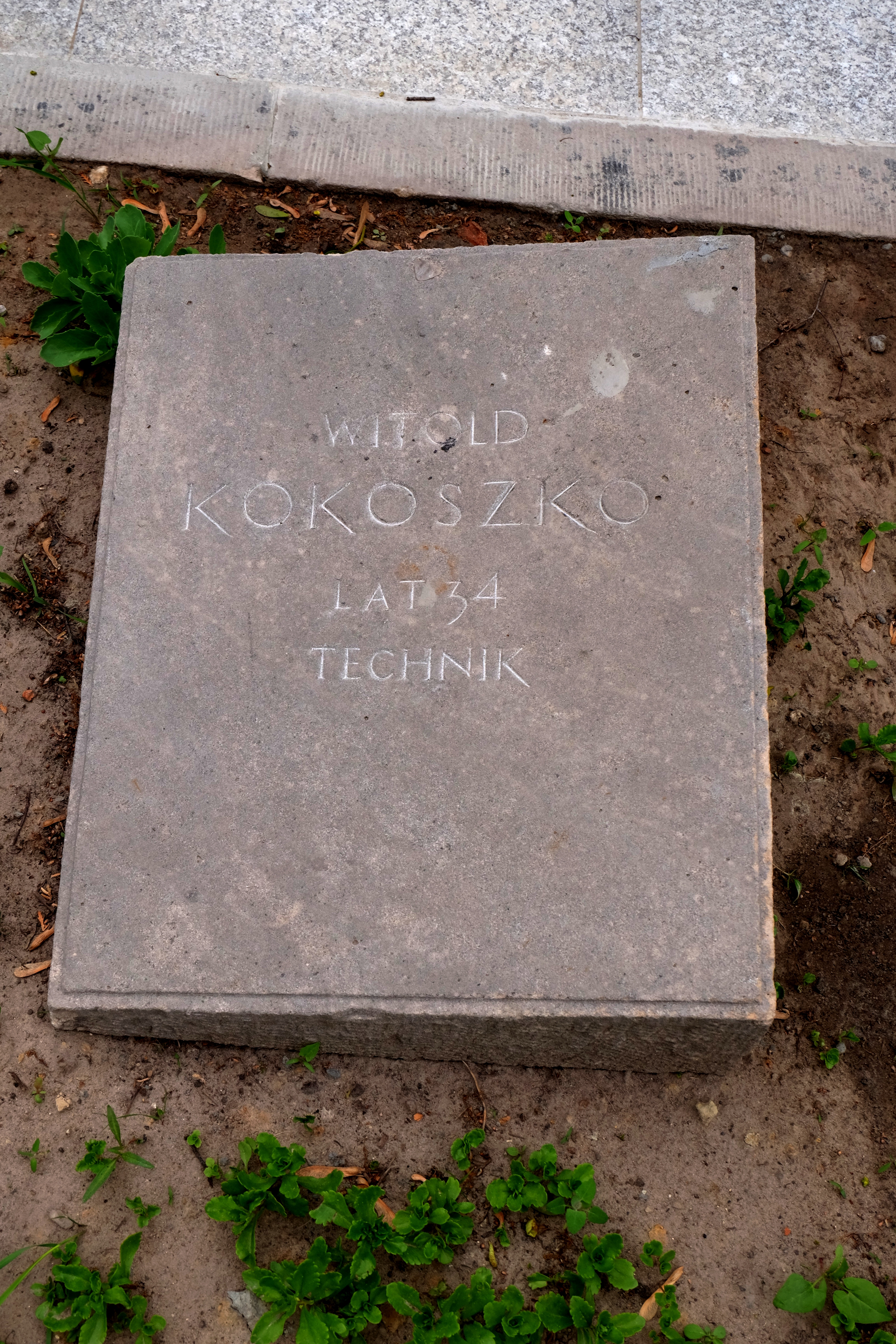 Grób działacza komunistycznego Witolda Kokoszki na Cmentarzu Wojskowym na Powązkach w Warszawie